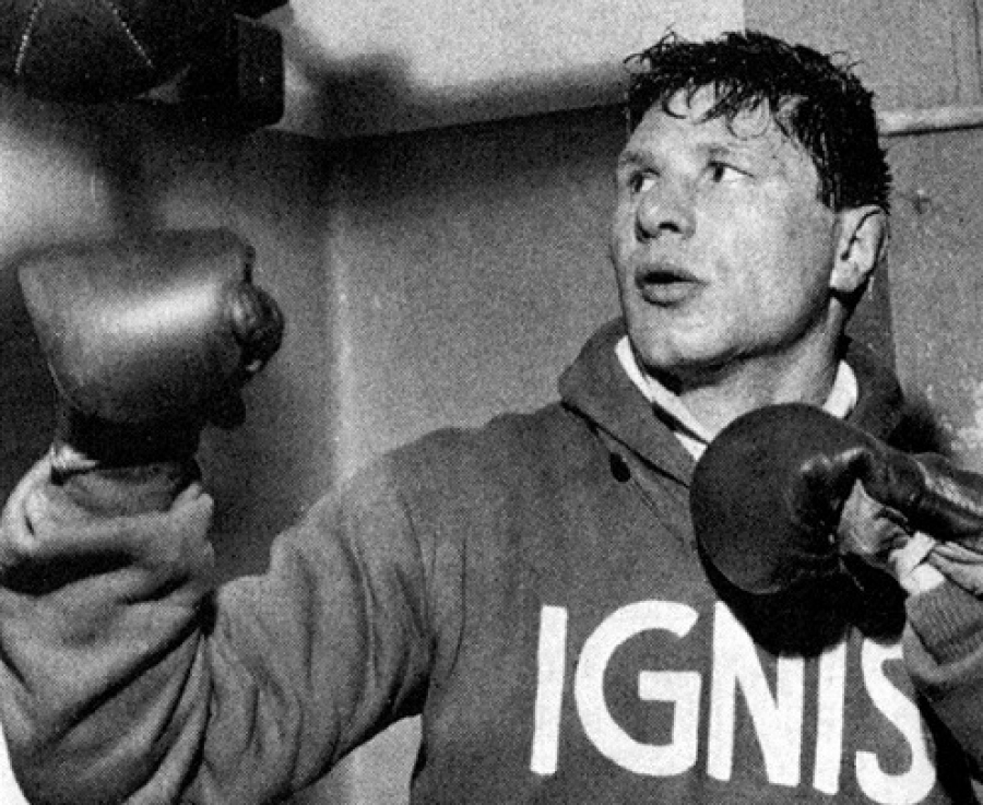 pugile italiano